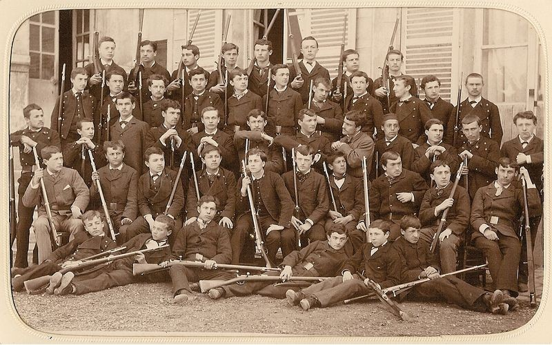 Lycée Jean-Baptiste-Say (Paris 16e arrond). Photo de groupe, préparation militaire. Probablement photo de Jules David.